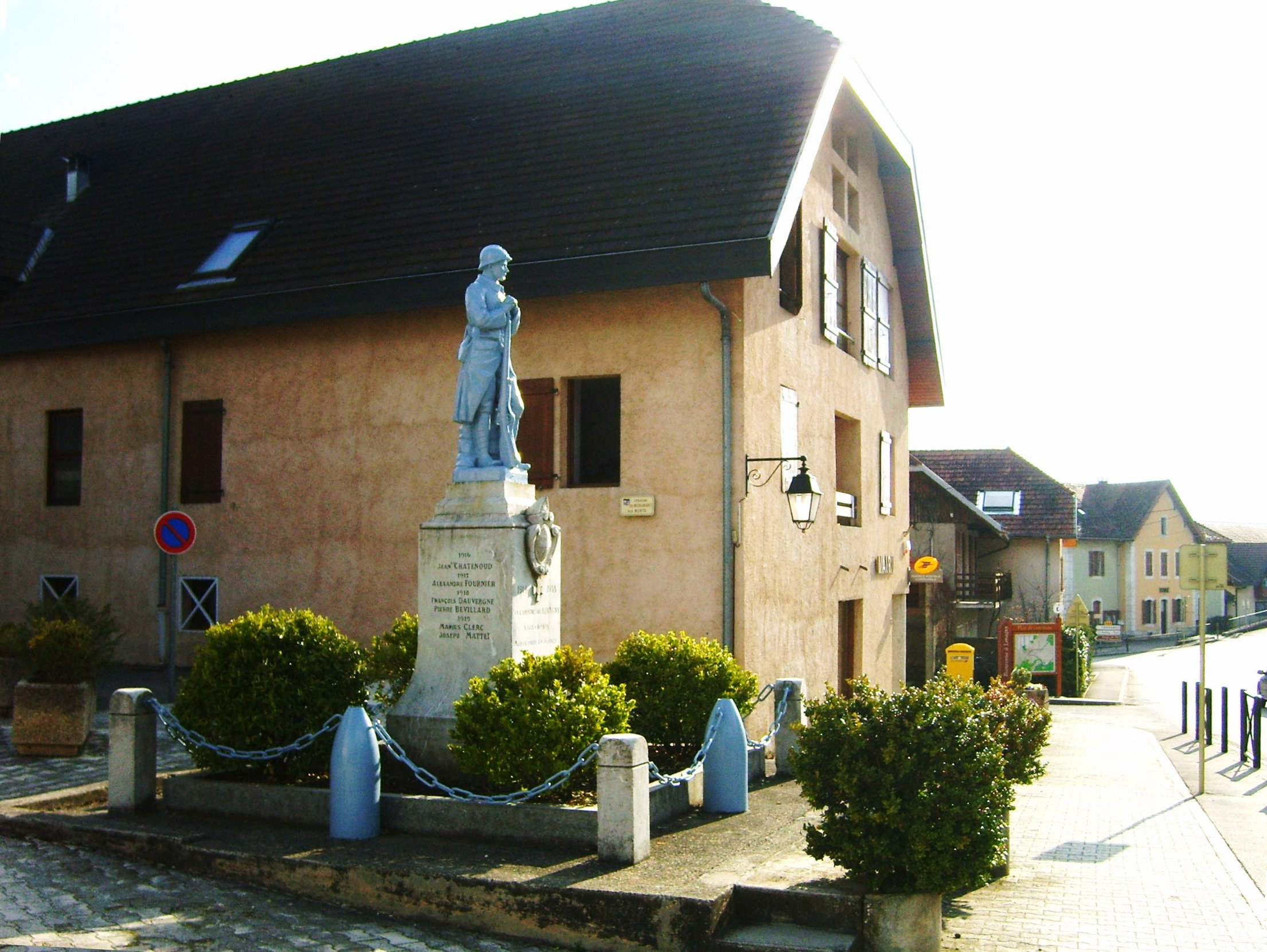 Lovagny, commune française, située dans le département de la Haute-Savoie et la région Rhône-Alpes. Vue sur le monument aux morts situé place de l'église.